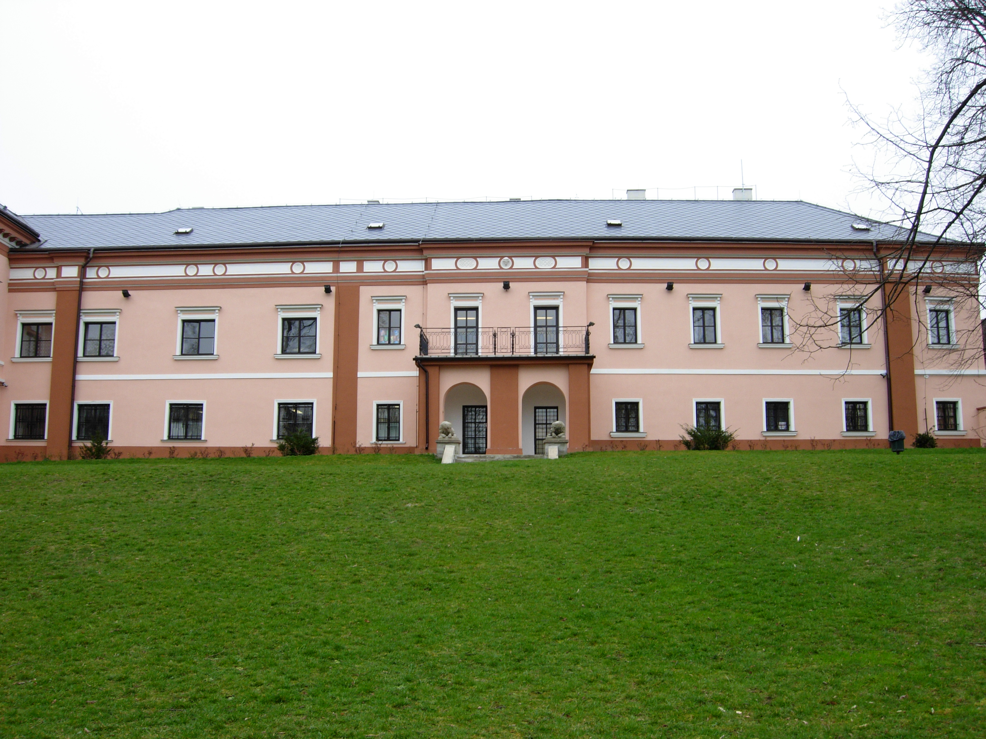 Čakovický zámek.